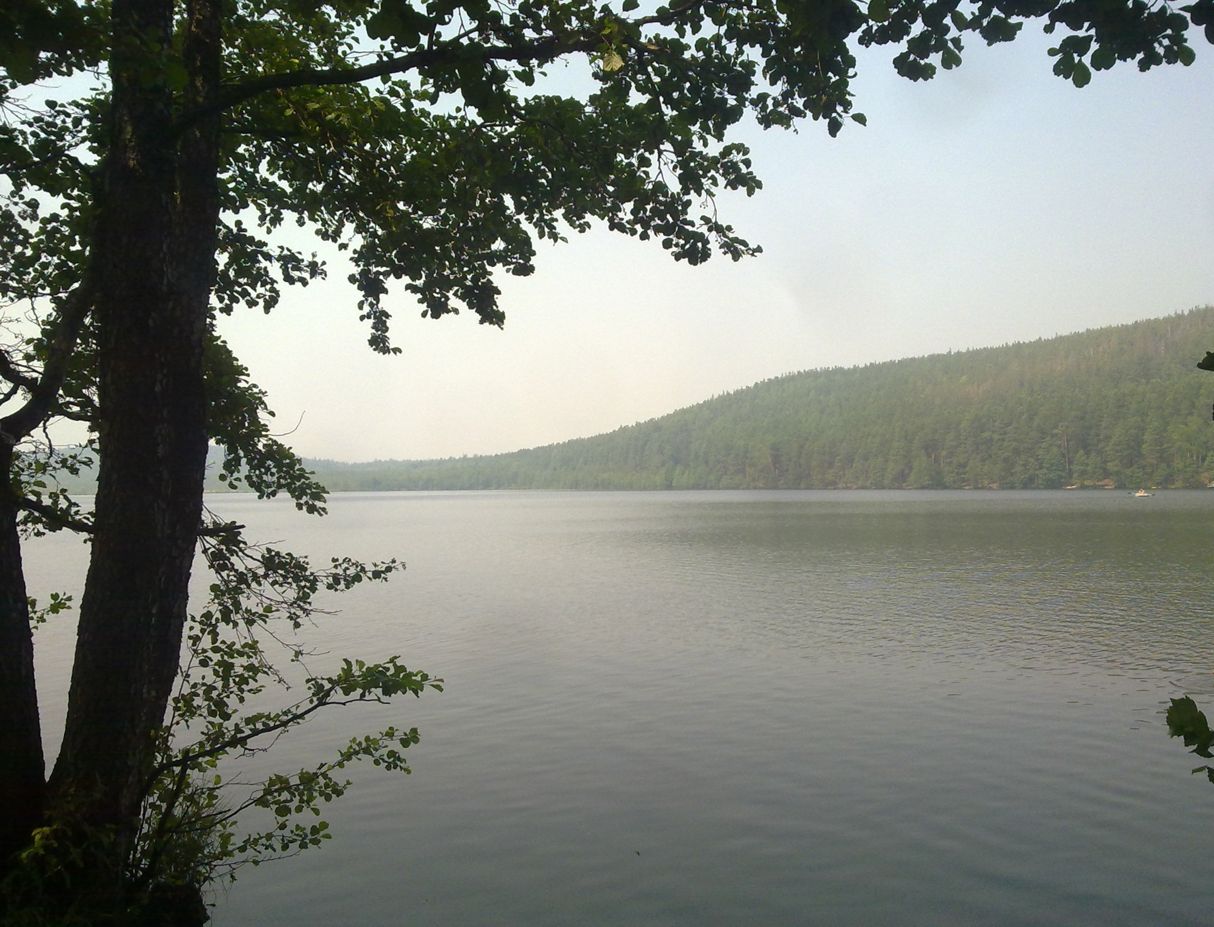 Песчаное озеро, Екатеринбург This image is related to the protected area of Russia number 6610212